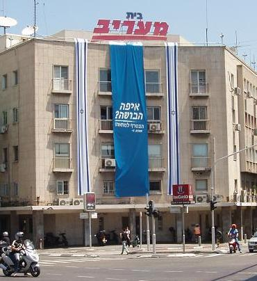 Maariv House, Tel Aviv